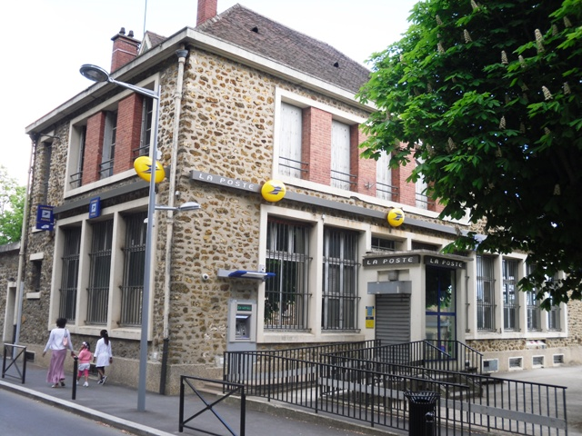 L'agence postale du centre-ville d'Athis-Mons (Essonne, Île-de-France, France).